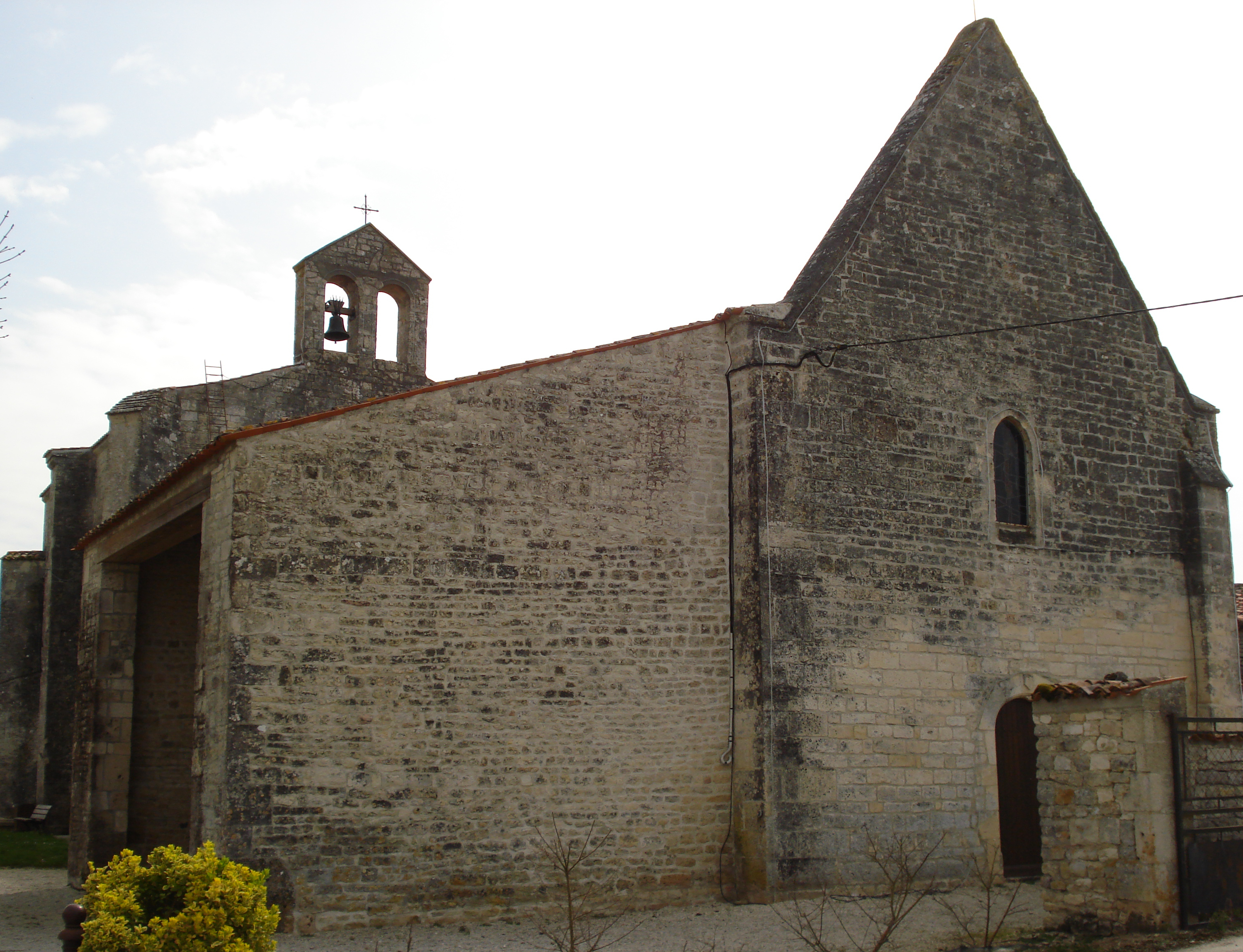 L'église de Chives en Charente-Maritime